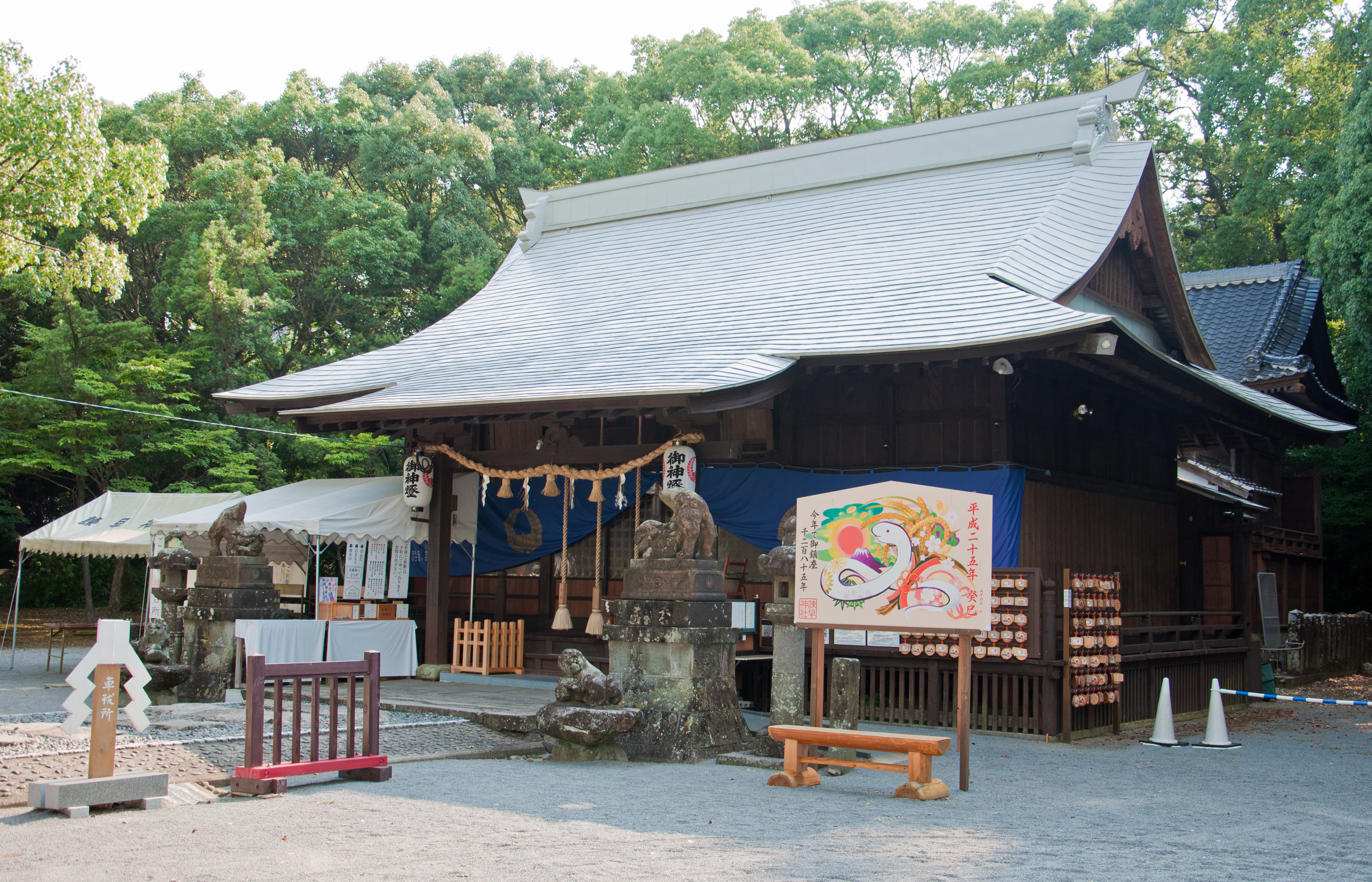 長崎県諫早市にある諫早神社